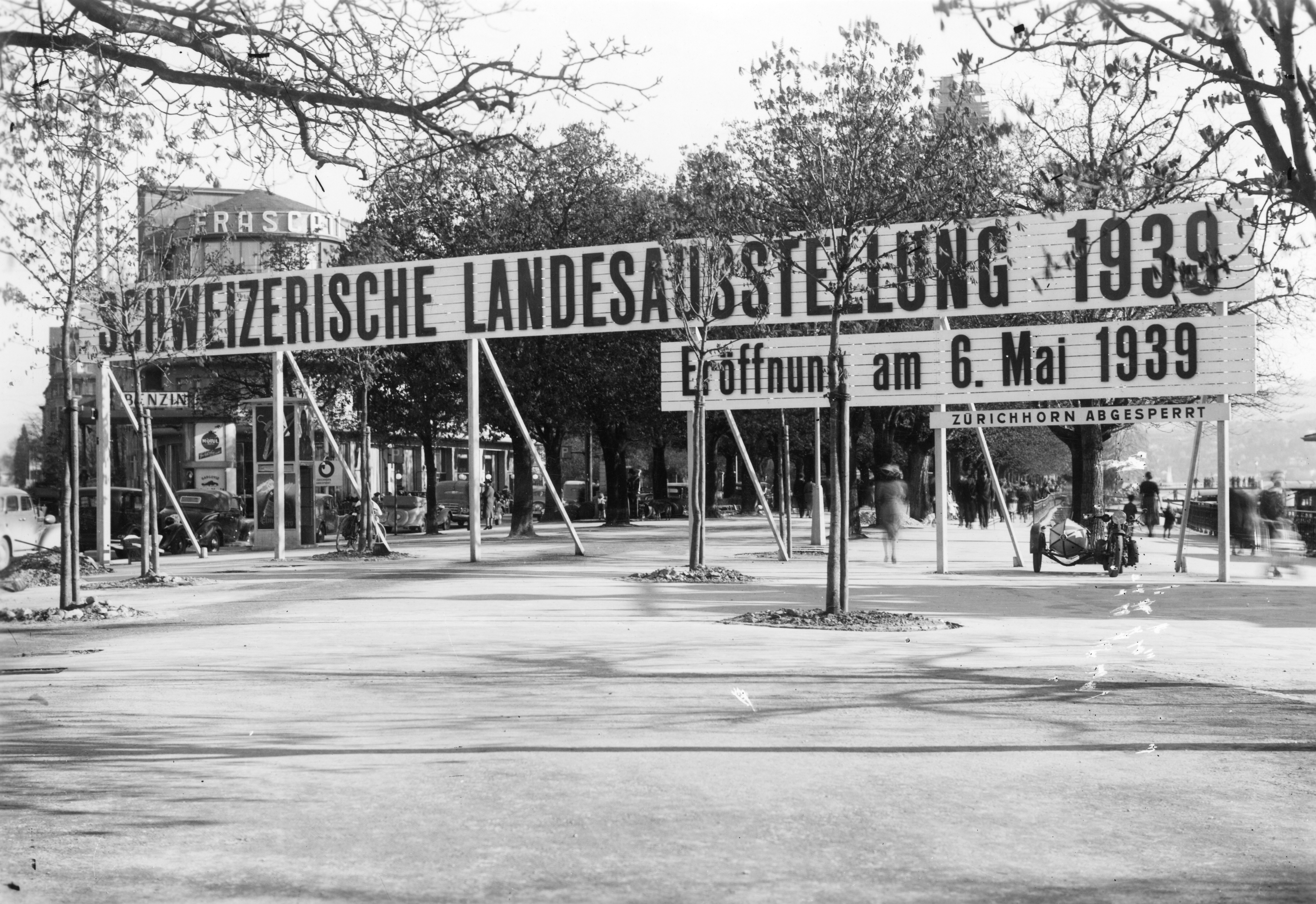 Landesausstellung 1939 in Zürich, Schweiz